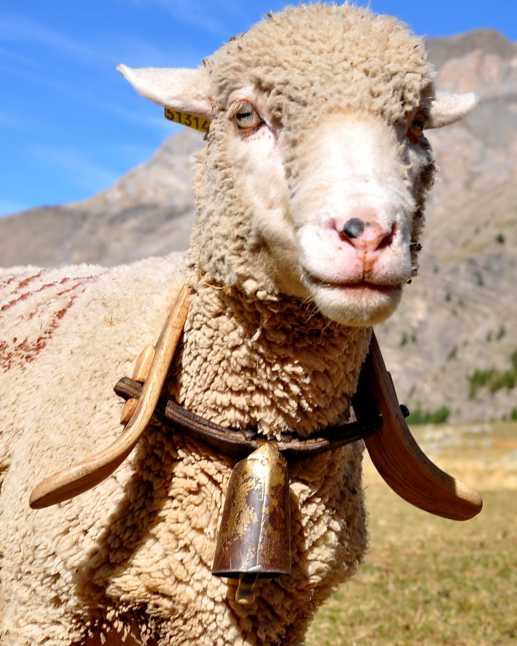 Mouton avec une sonnaille